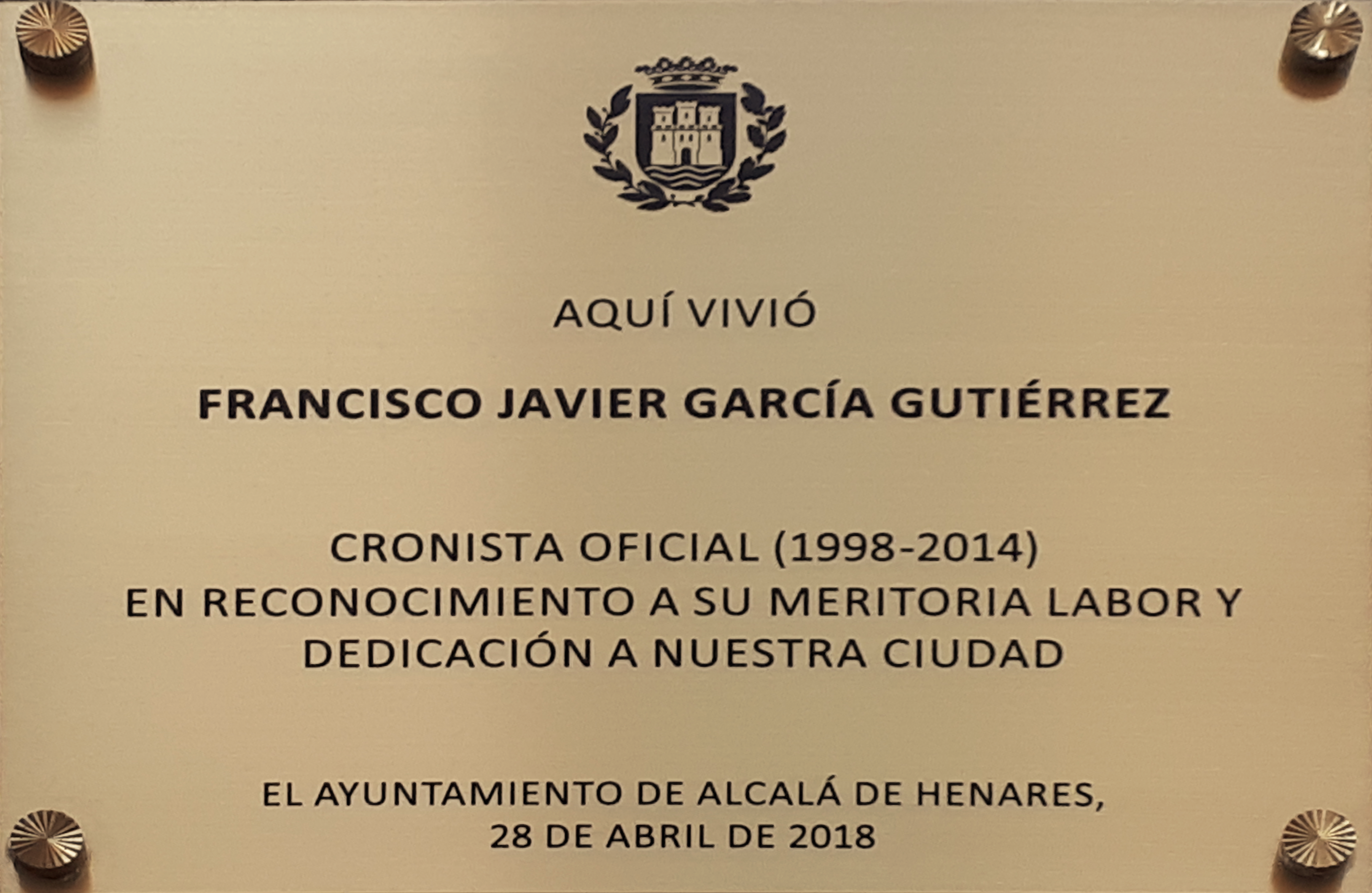 Placa conmemorativa dedicada a Francisco Javier García Gutiérrez como Cronista Oficial de Alcalá de Henares. La placa se inauguró el 28 de abril de 2018, a la entrada del edificio que fue su última residencia, en la calle Postigo, nº 14, de Alcalá de Henares (Comunidad de Madrid - España).